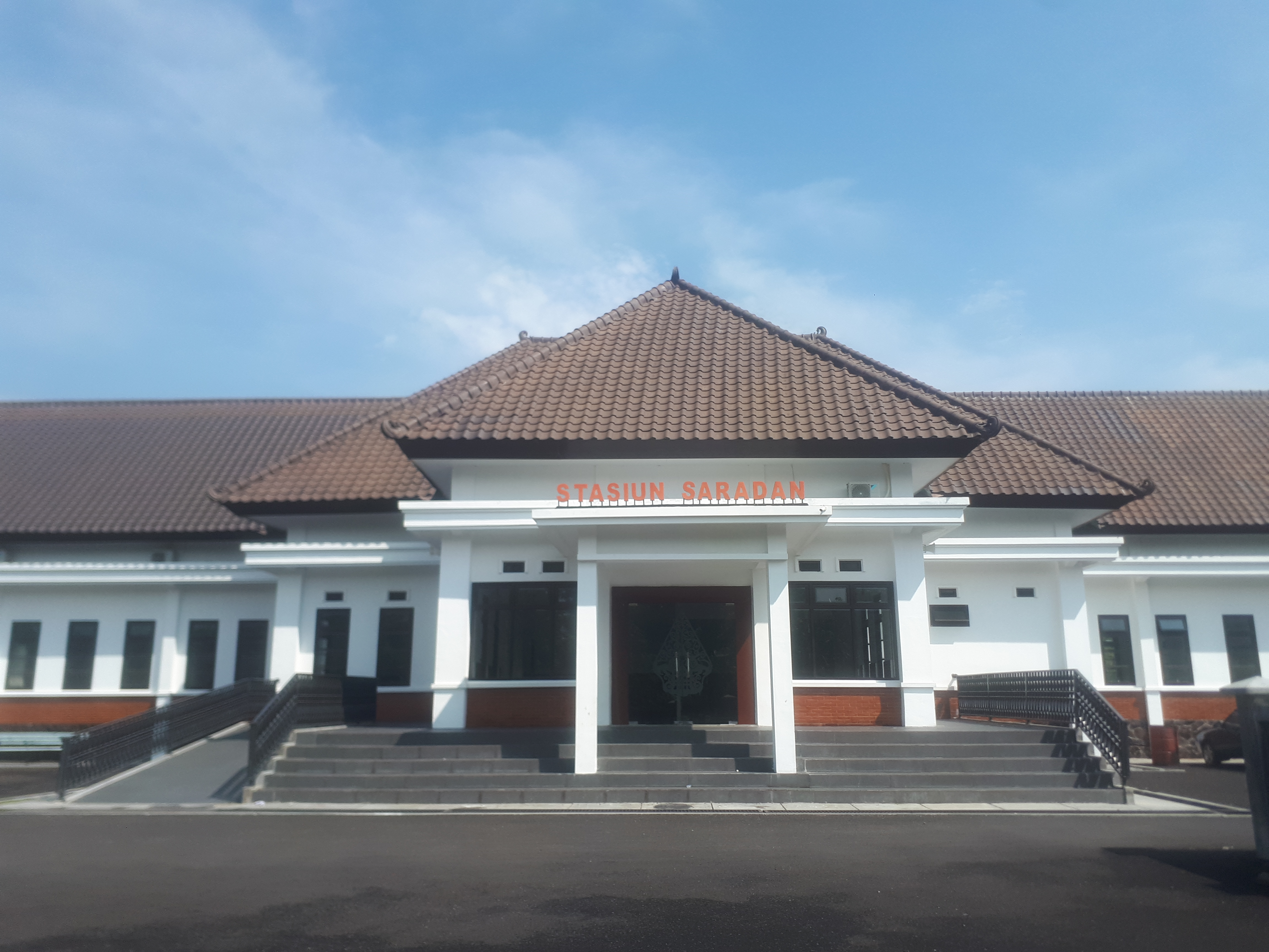 Tampak depan Stasiun Saradan Baru yang mulai beroperasi pada 30 April 2019 bersamaan dengan aktivasi rel jalur ganda Babadan - Nganjuk.